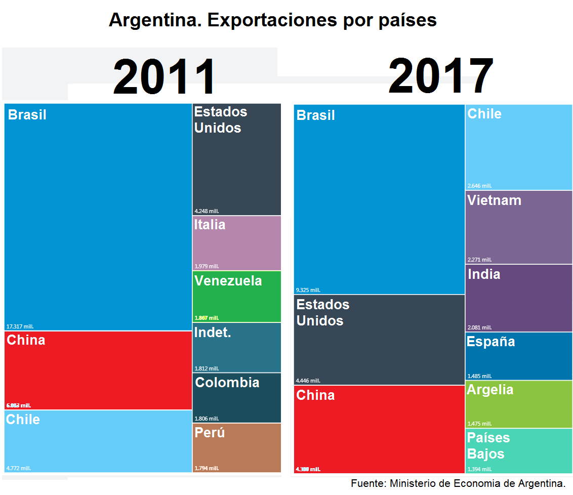 Argentina. Exportaciones por país. Comparativo 2011 & 2017. Fuente: Ministerio de Economía de la Nación Argentina. Exportaciones Estructural 2010-2017